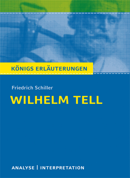 Cover einer Königs Erläuterungen Ausgabe aus dem Jahr 2012. Titel Wilhelm Tell von Schiller.